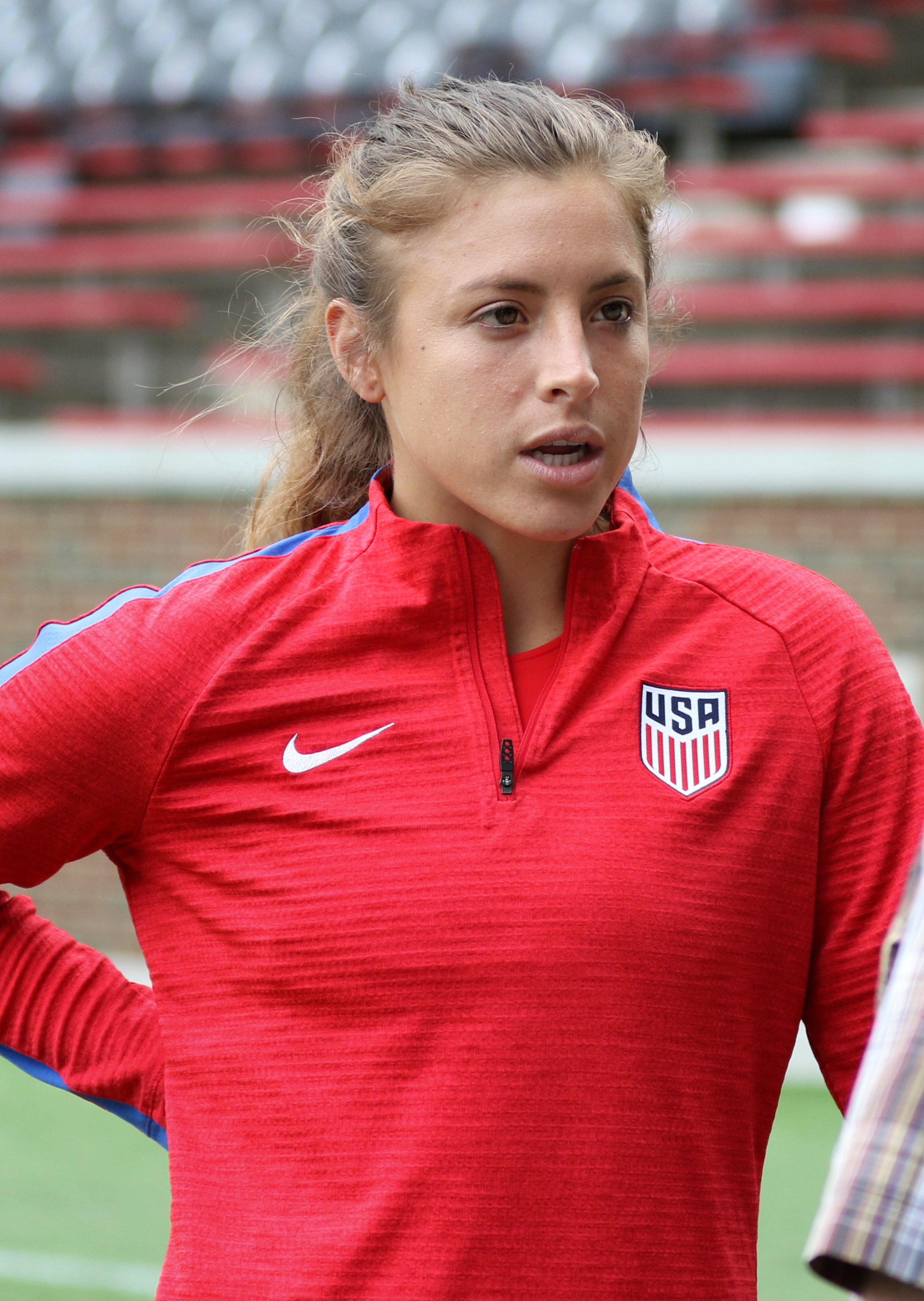 SofiaHuerta